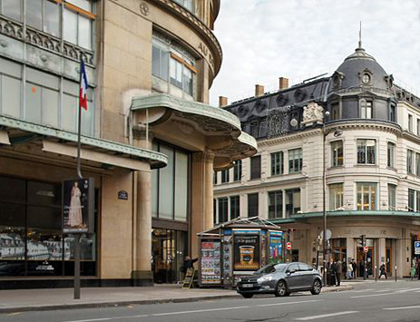 Magasins « Au Bon Marché », Paris, France. Deuxième magasin, à gauche